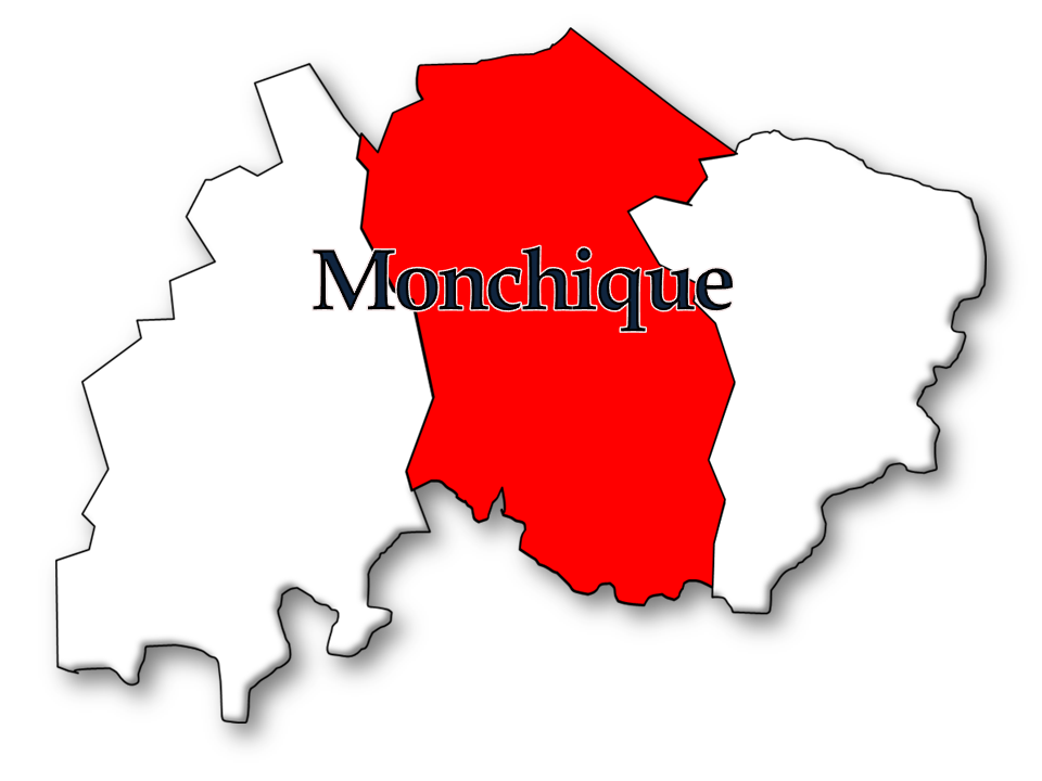 Censos 1864/2011